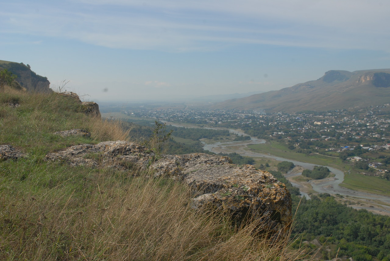 Вид на аул Али-Бердуковский